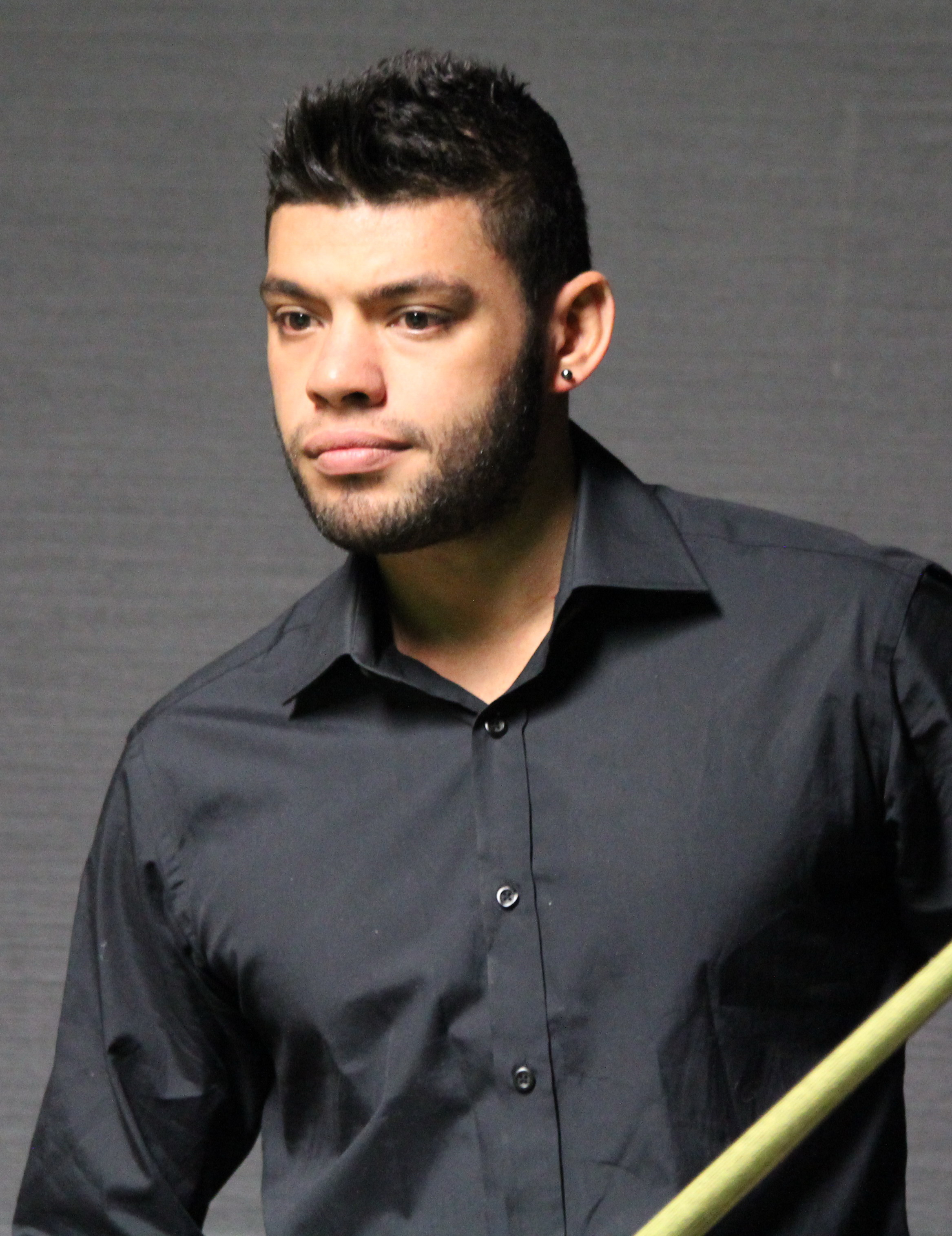 Vinnie Calabrese beim Paul Hunter Classic 2014